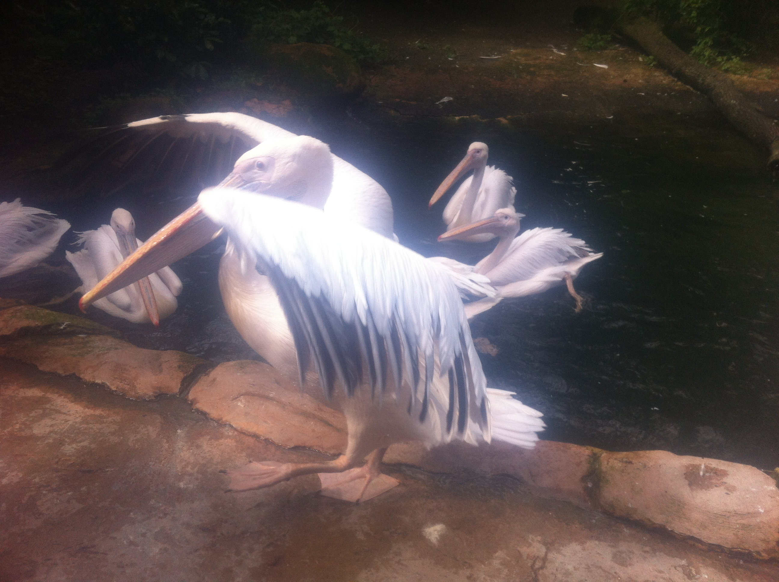 Pelikane im Zoo Hannover